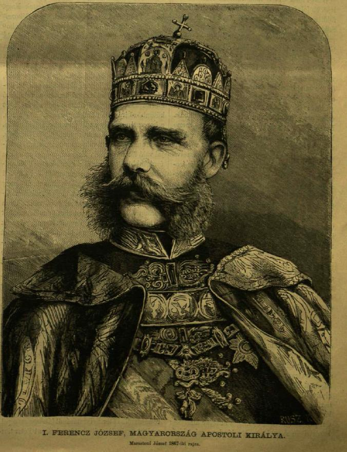 I. Ferenc_József a Szent Koronával a Vasárnapi Újságban illusztráció Marastoni József rajza után